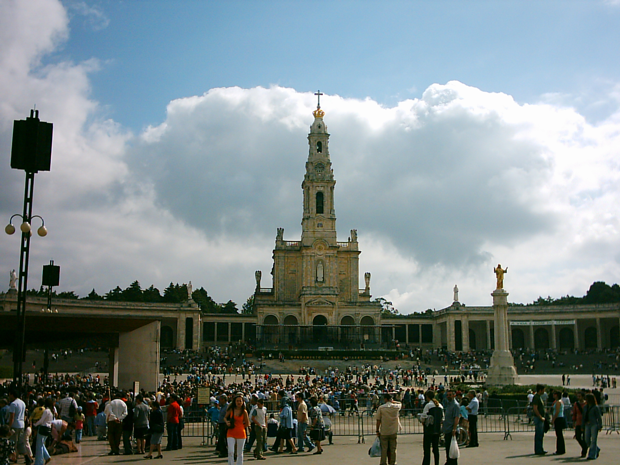 Santuário de Fátima, Fátima, Portugal